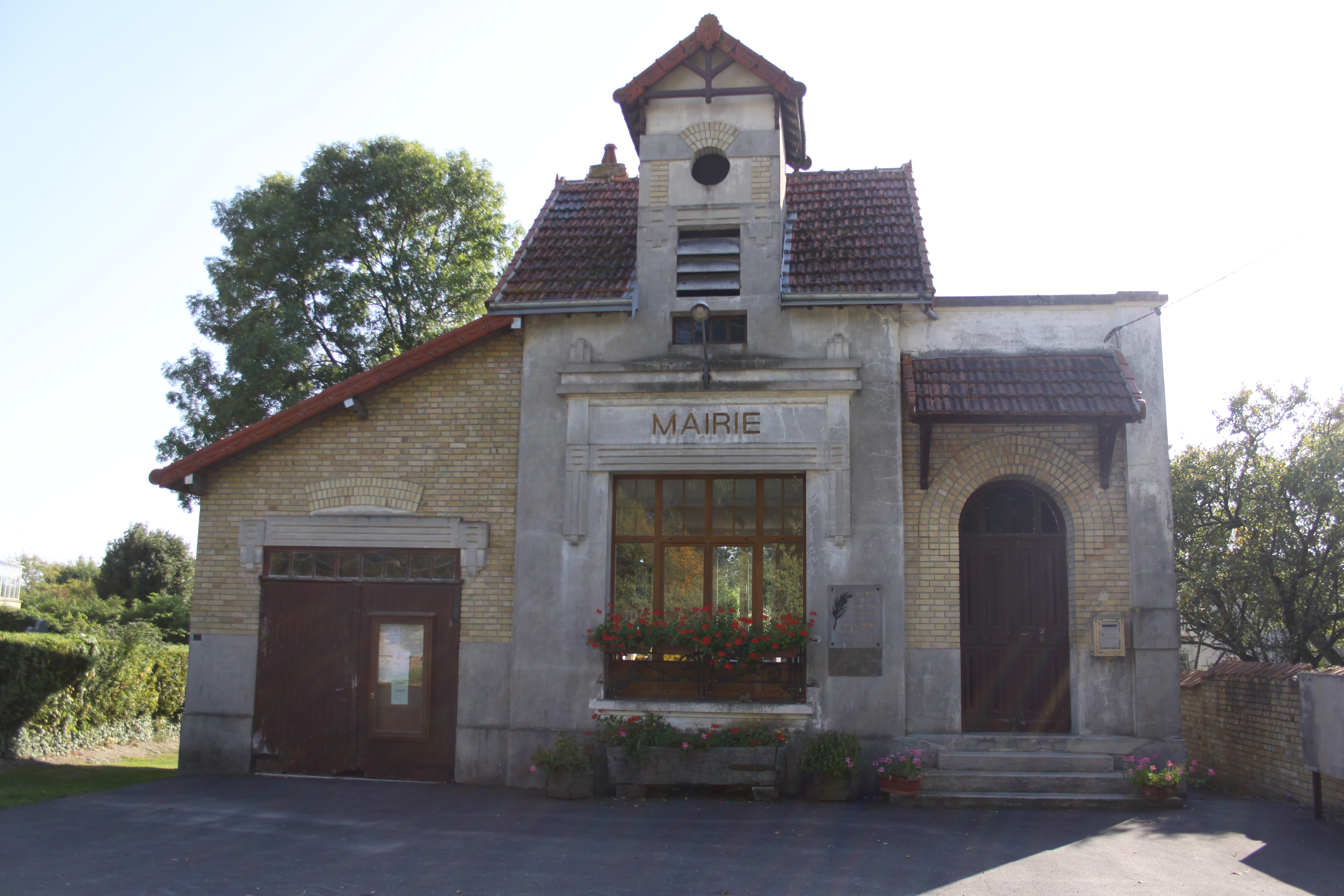 Village Ardennais